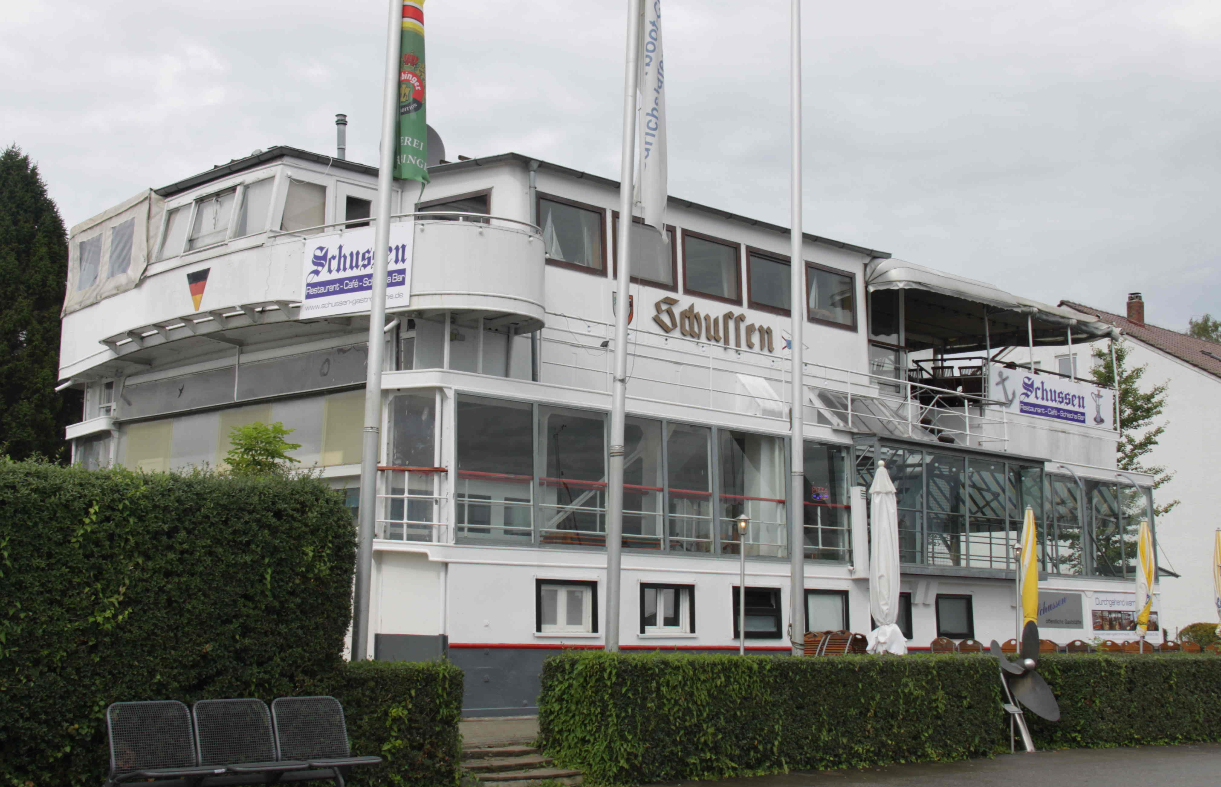 ehemalige Eisenbahnfähre Schussen, heute Clubheim